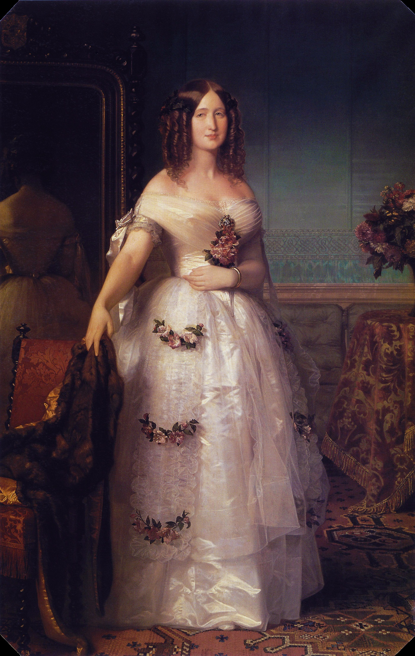 María Eugenia de Guzmán, contessa di Teba, nota come Eugenia de Montijo, futura Imperatrice dei Francesi come sposa di Napoleone III Bonaparte.